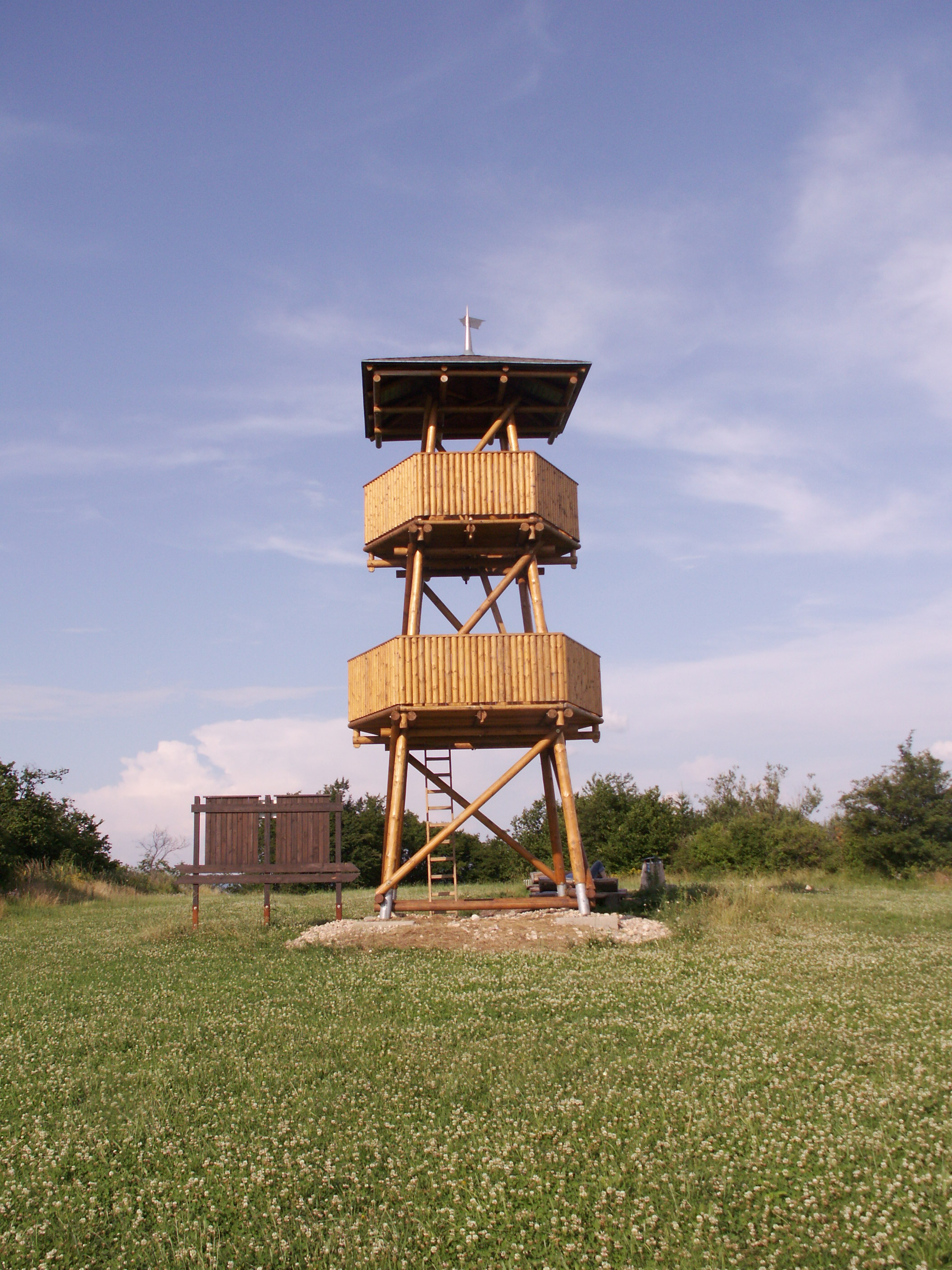 Rozhledna na vrchu Malý Chlum u Obory (okres Blansko)